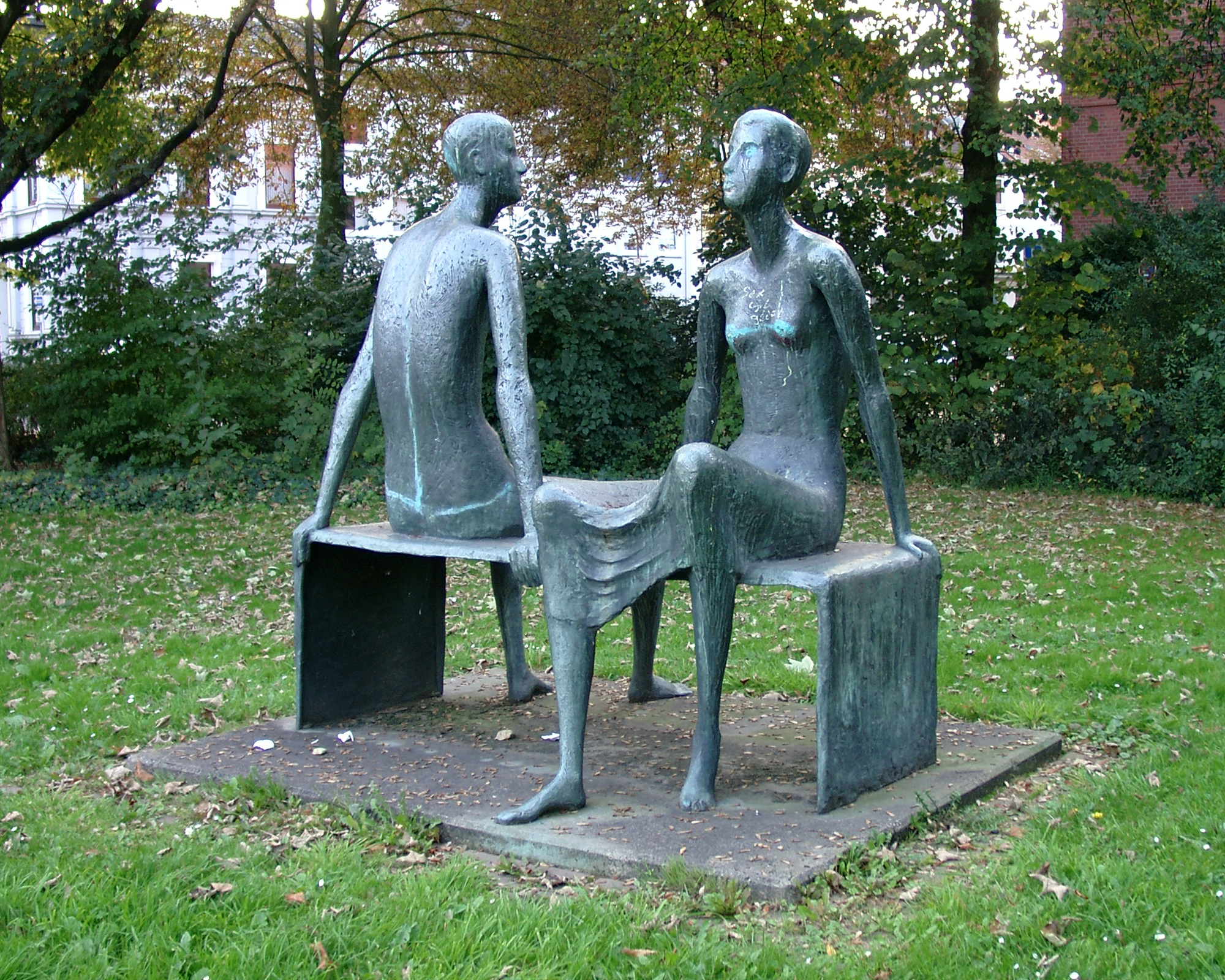 Skulptur "Sitzendes Paar" von Alice Peters, Schulstraße, Bremen, Germany